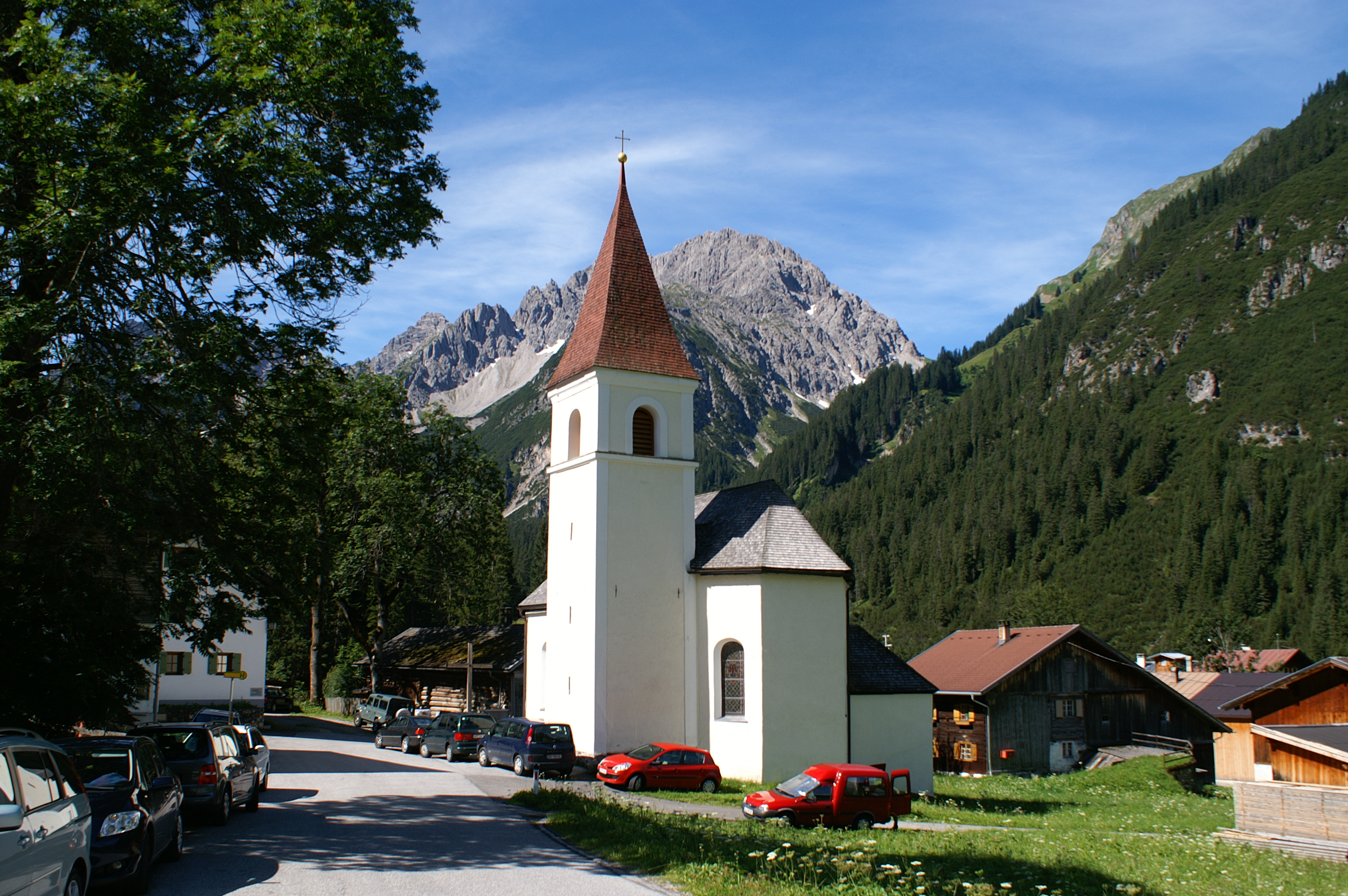 Kath. Filialkirche Kaplaneikirche hl. Josef in Boden mit der Reichspitze (2590m) im Parzinn (Lechtaler Alpen)